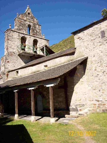 Iglesia de San Esteban, en Burbia (municipio de Vega de Espinareda, León, España)